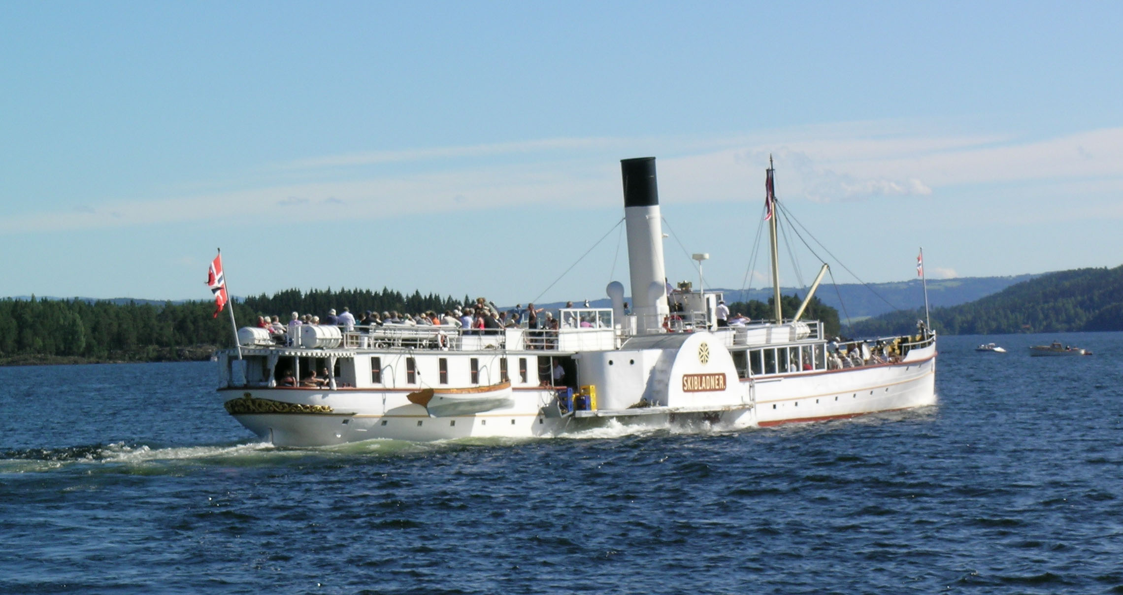 The steam paddler «Skibladner», Mjøsa, Norway.